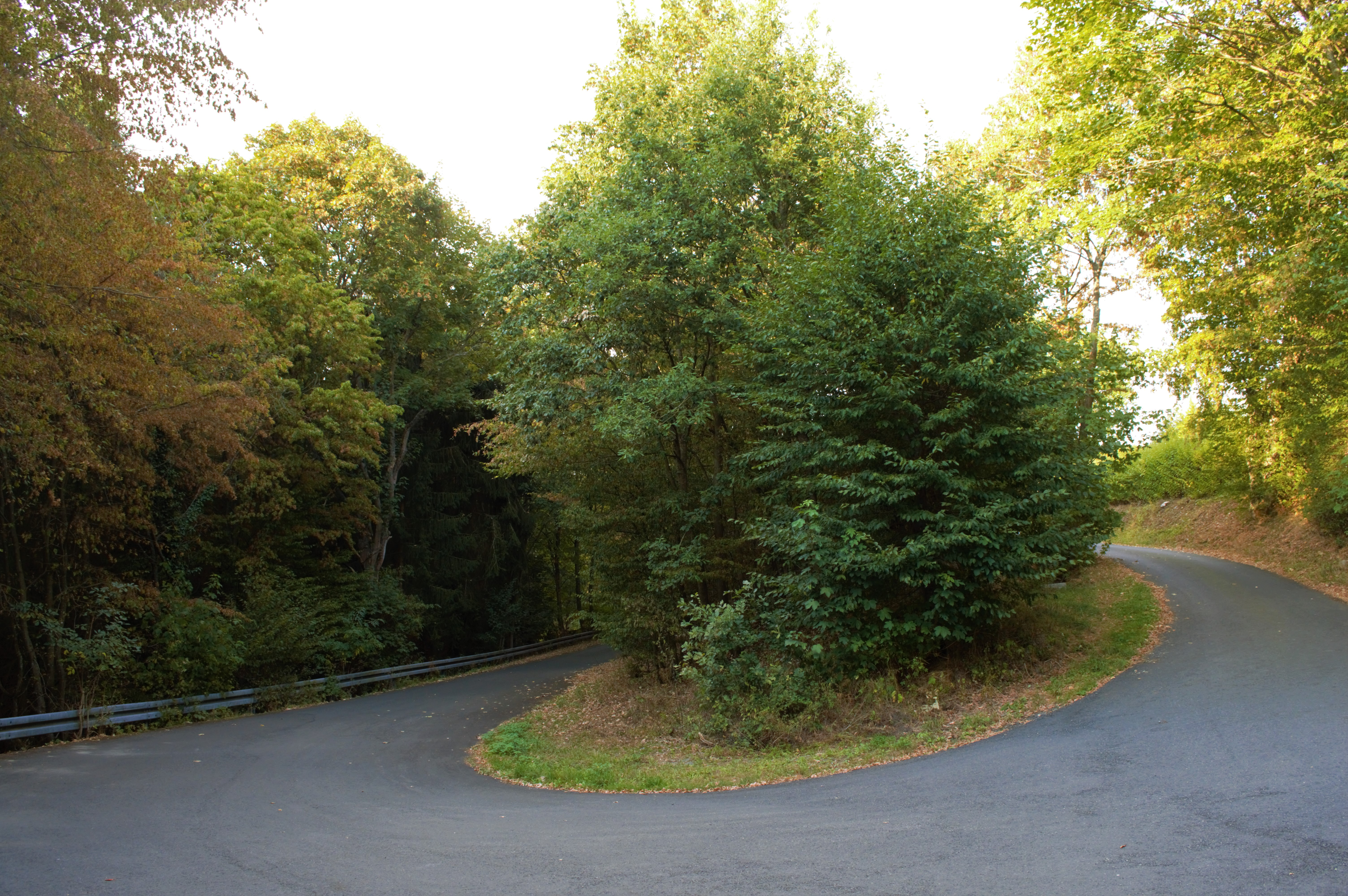 Hainbuchenallee in Kransberg (Usingen)